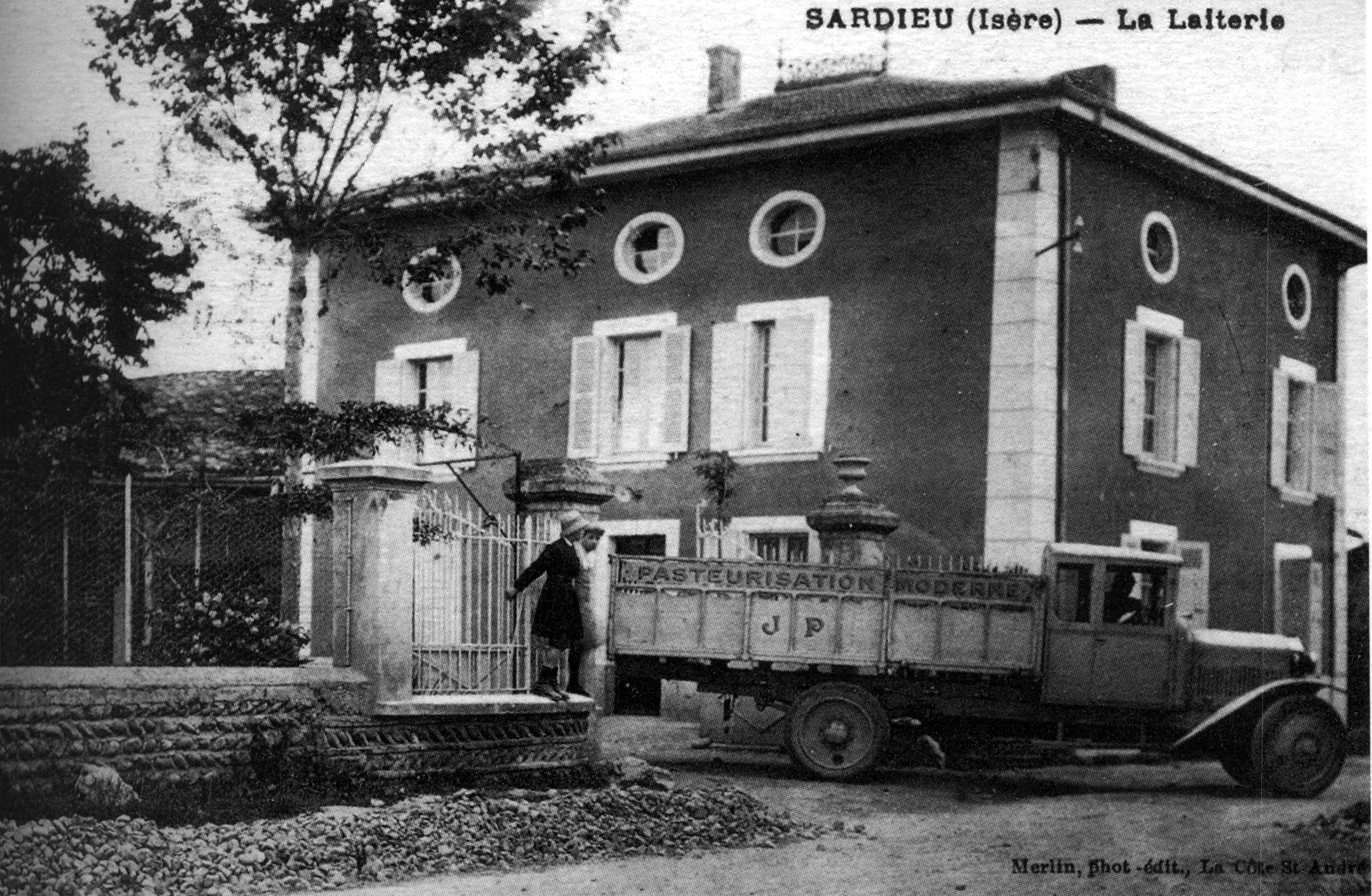 Sardieu, la laiterie, vers 1930